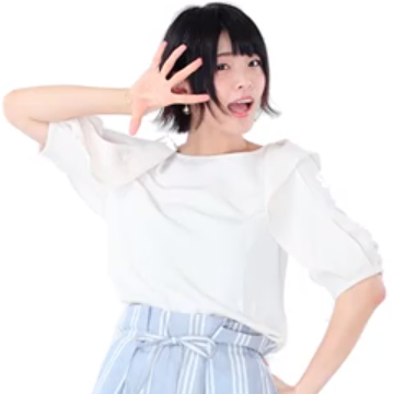 池羽悠（声優）